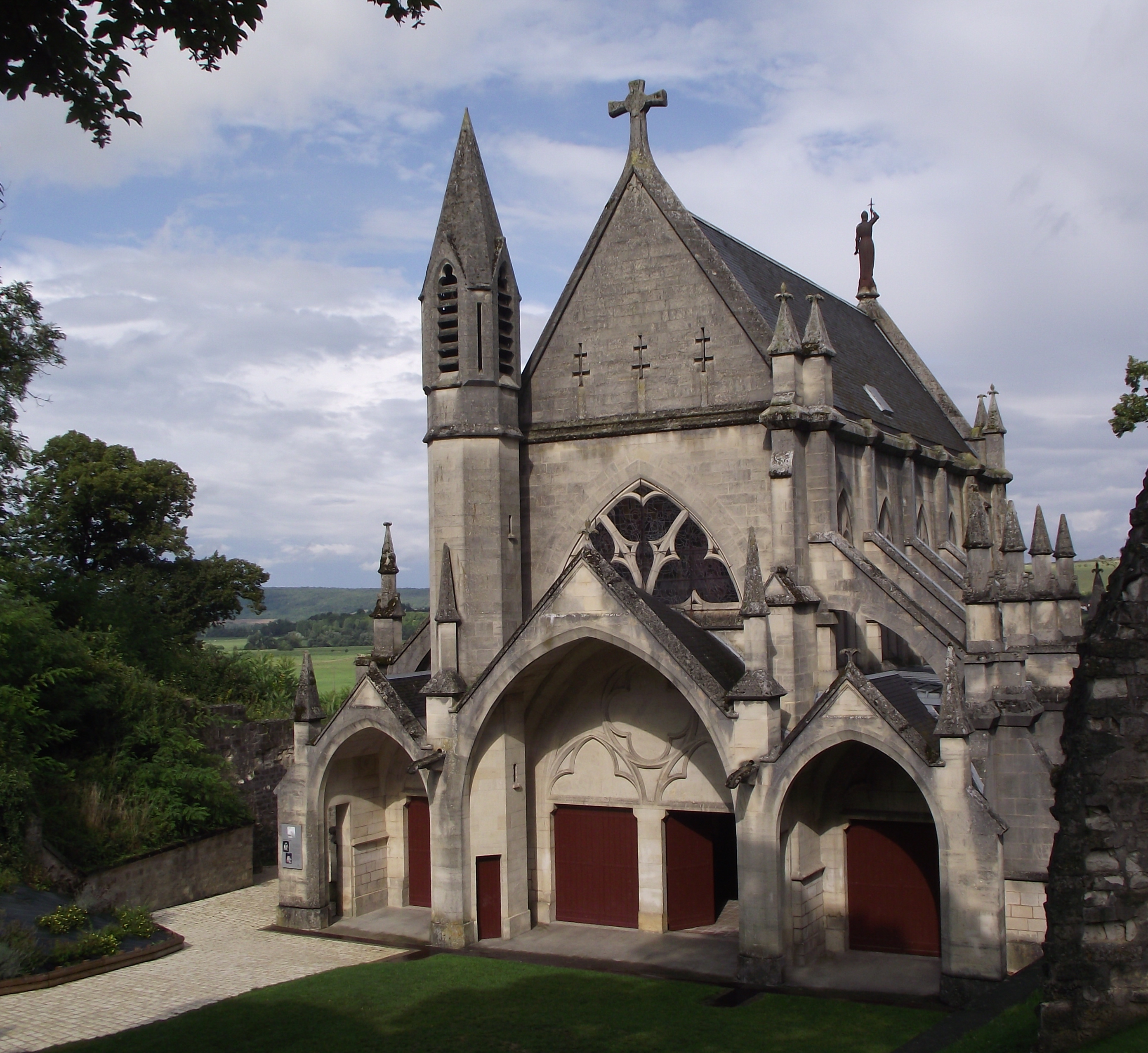 Chapelle Castrale à Vaucouleurs (Meuse)